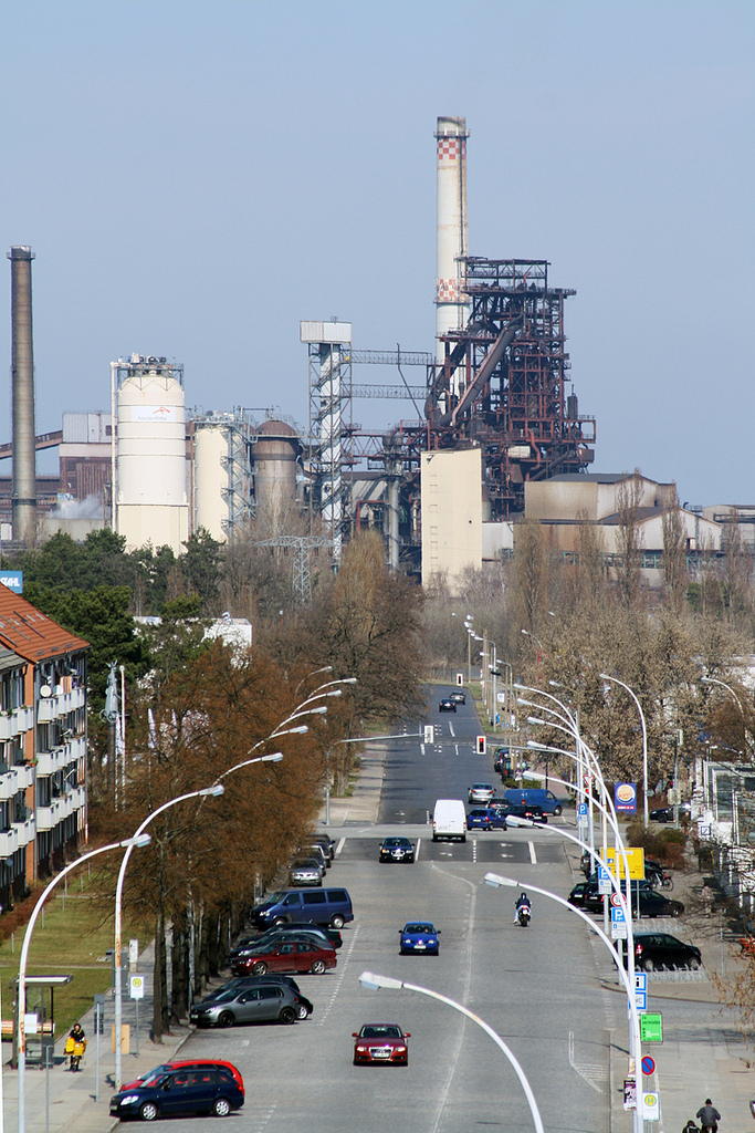 Weg zum Hochofen 5A des ArcelorMittal-Werks in Eisenhüttenstadt, der jüngsten Stadt Deutschlands, Brandenburg.